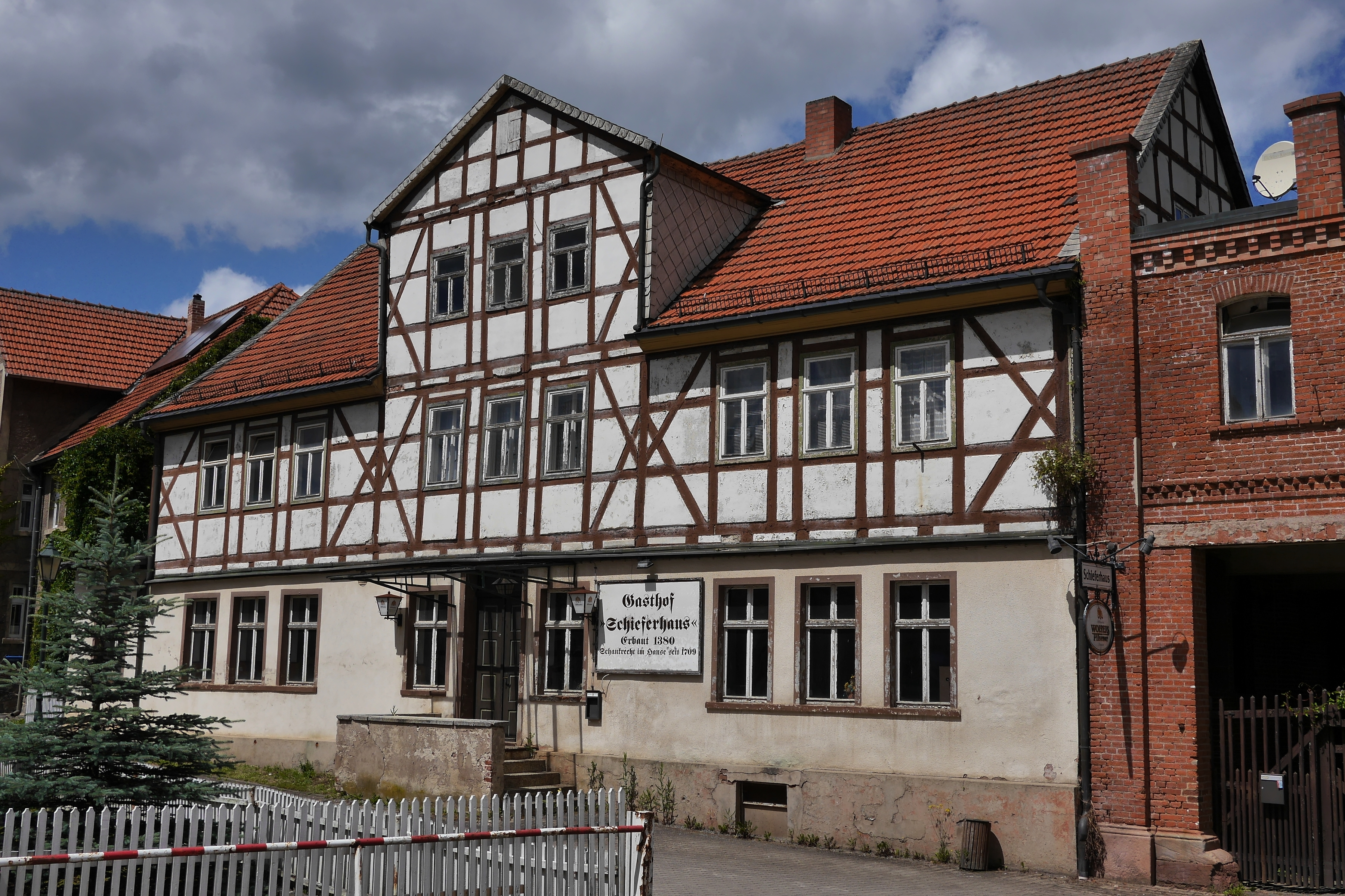 Gasthof Schieferhaus in Wippra, nicht mehr in Betrieb